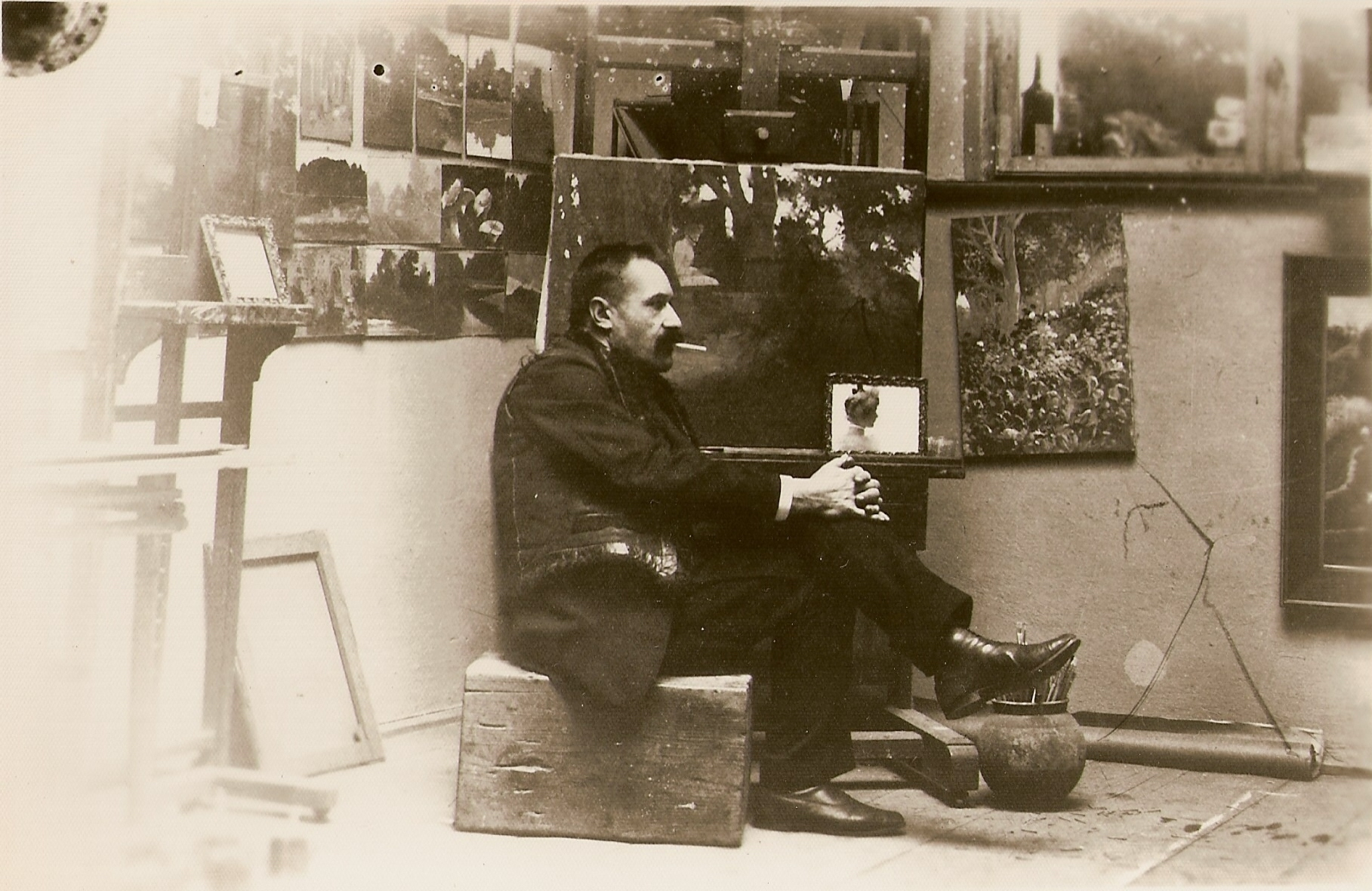 Fotografia autorstwa Apolinarego Kotowicza: autoportret w pracowni artysty